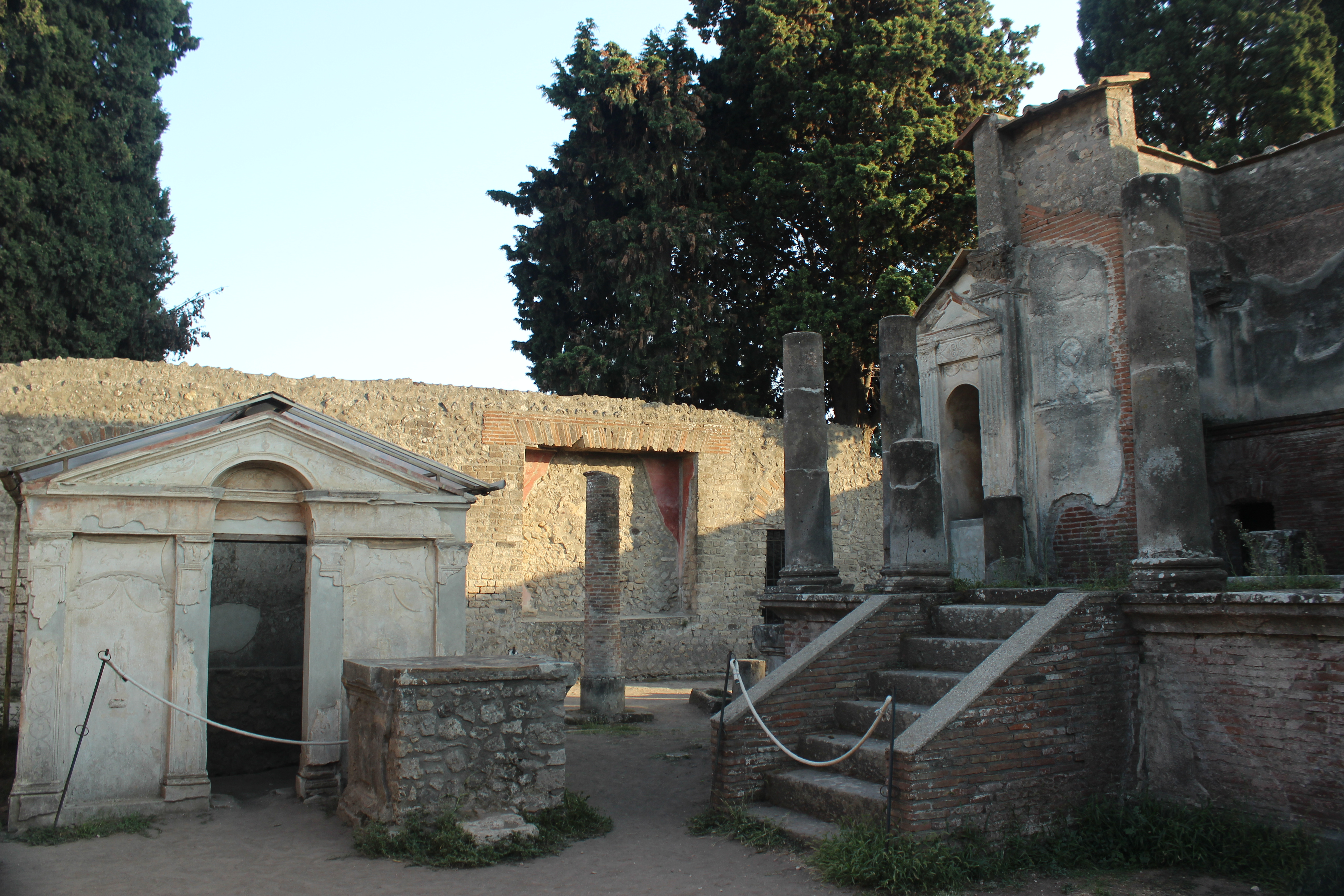 Pompeya, templo de Isis.